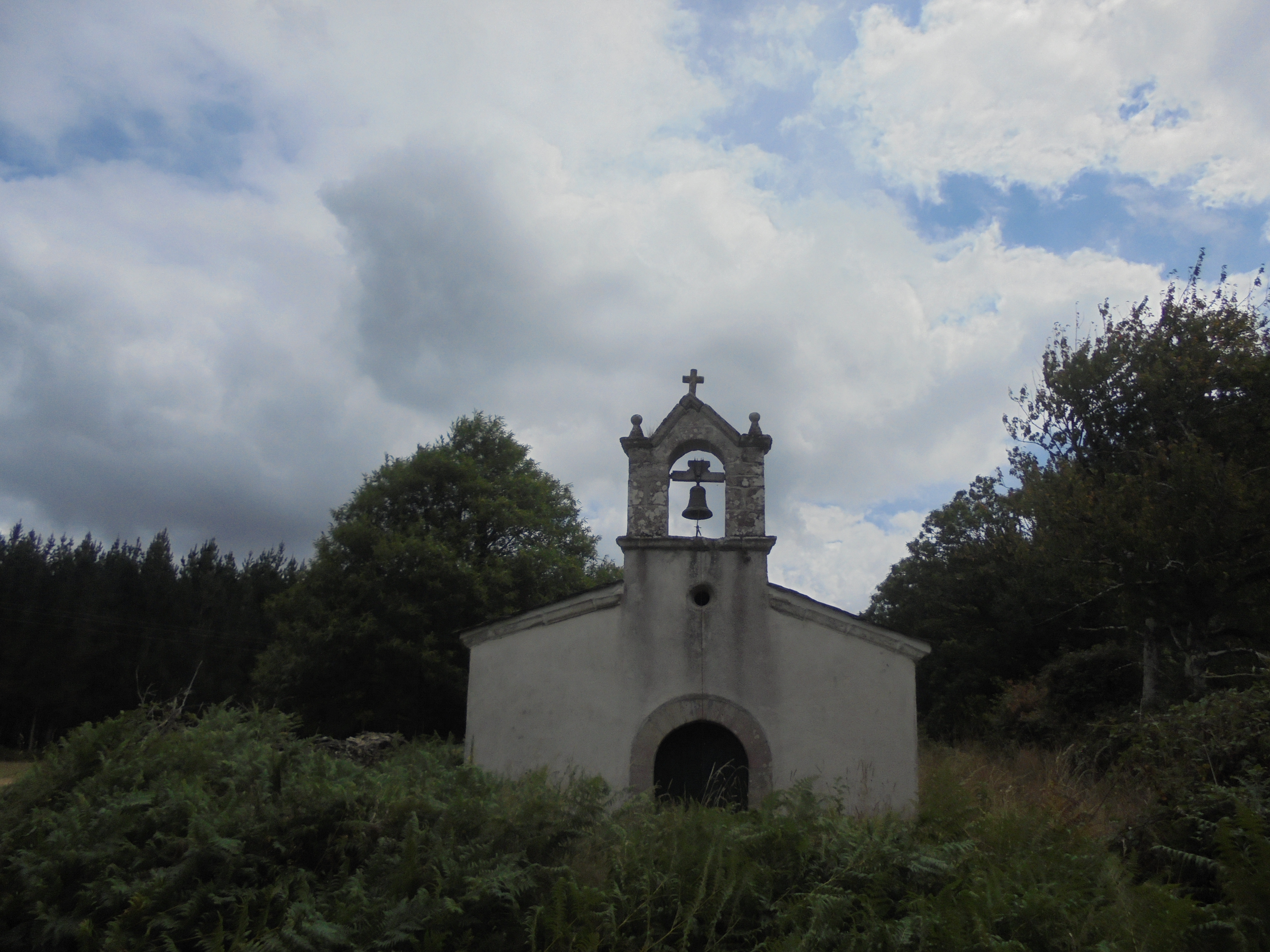 Capela de Santo Estevo de Folgosa ( O Corgo)